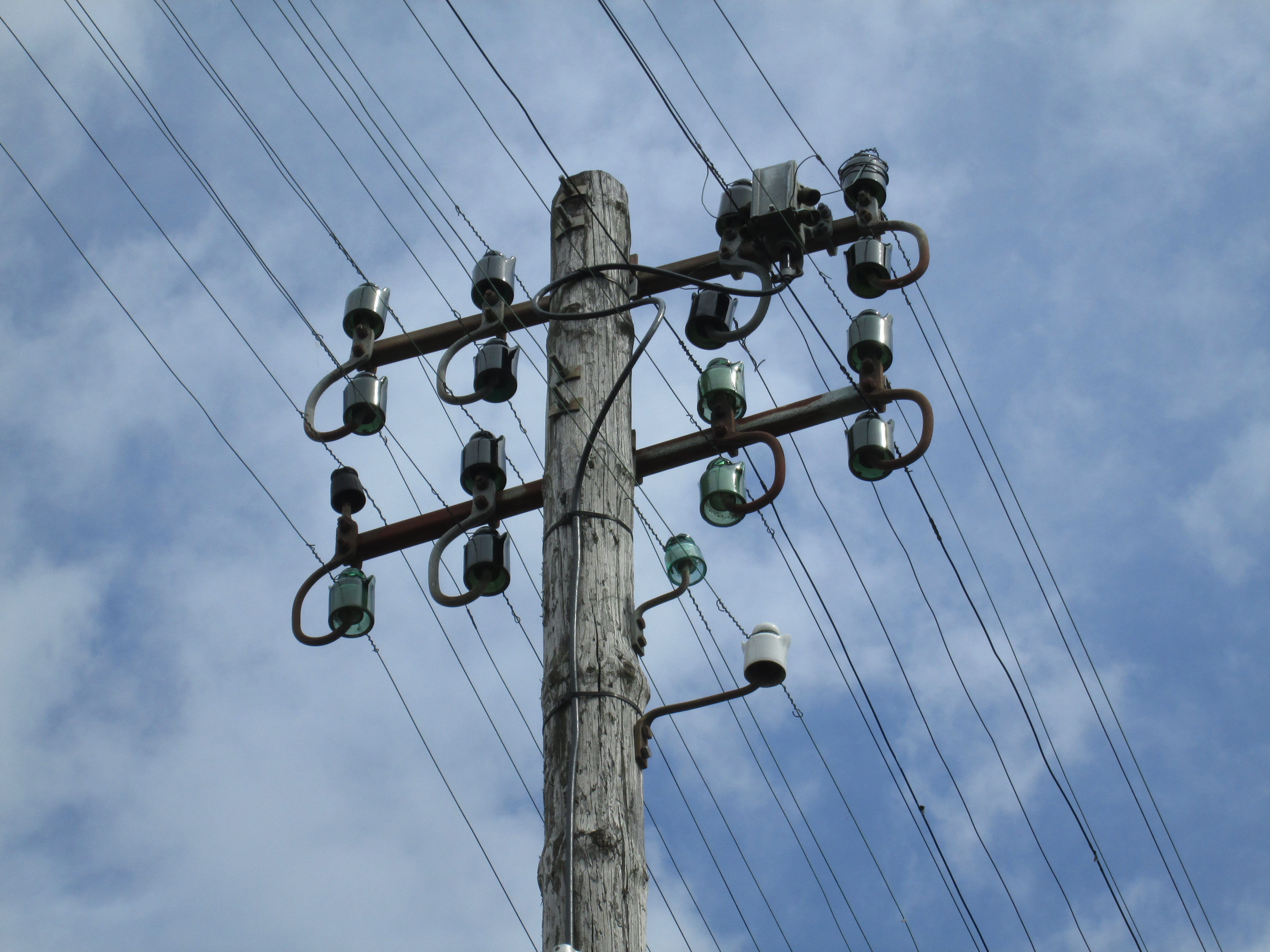 Photographie prise à Chantonnay et montrant un exemple de ligne téléphonique telle qu'elles étaient à l'époque de la technologie des câbles en cuivre nus sur isolateurs.